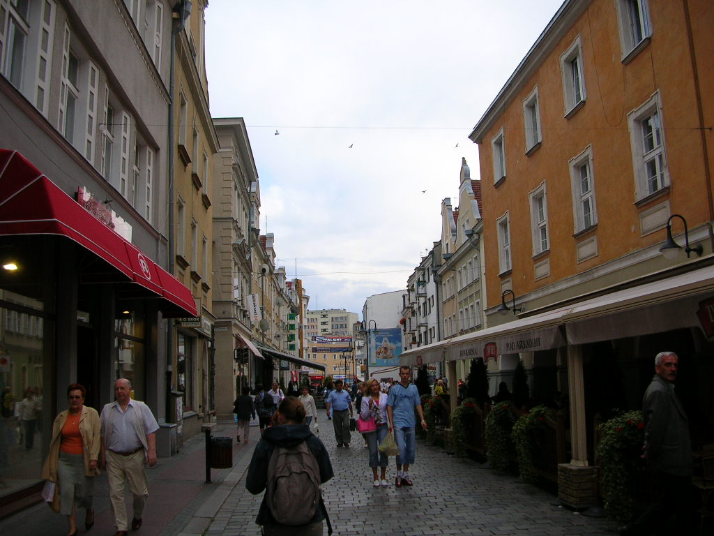 Opole - ul.Krakowska Autor - Bartek Wawraszko ( Bast )